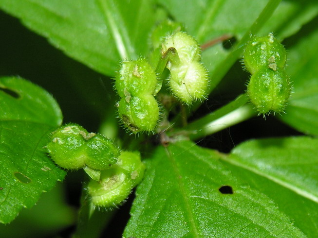 Daugiamečio laiškenio (Mercurialis perennis) vaisiai Šeima. Karpažoliniai (Euphorbiaceae) Foto: Algirdas, 2006 m. birželio 2 d.